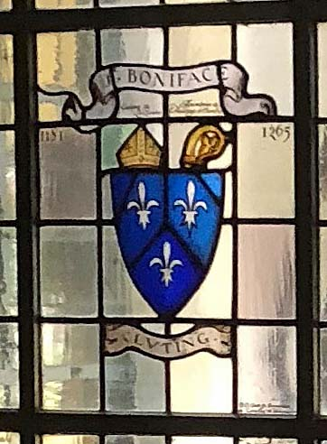 Blason de St Boniface de Bruxelles